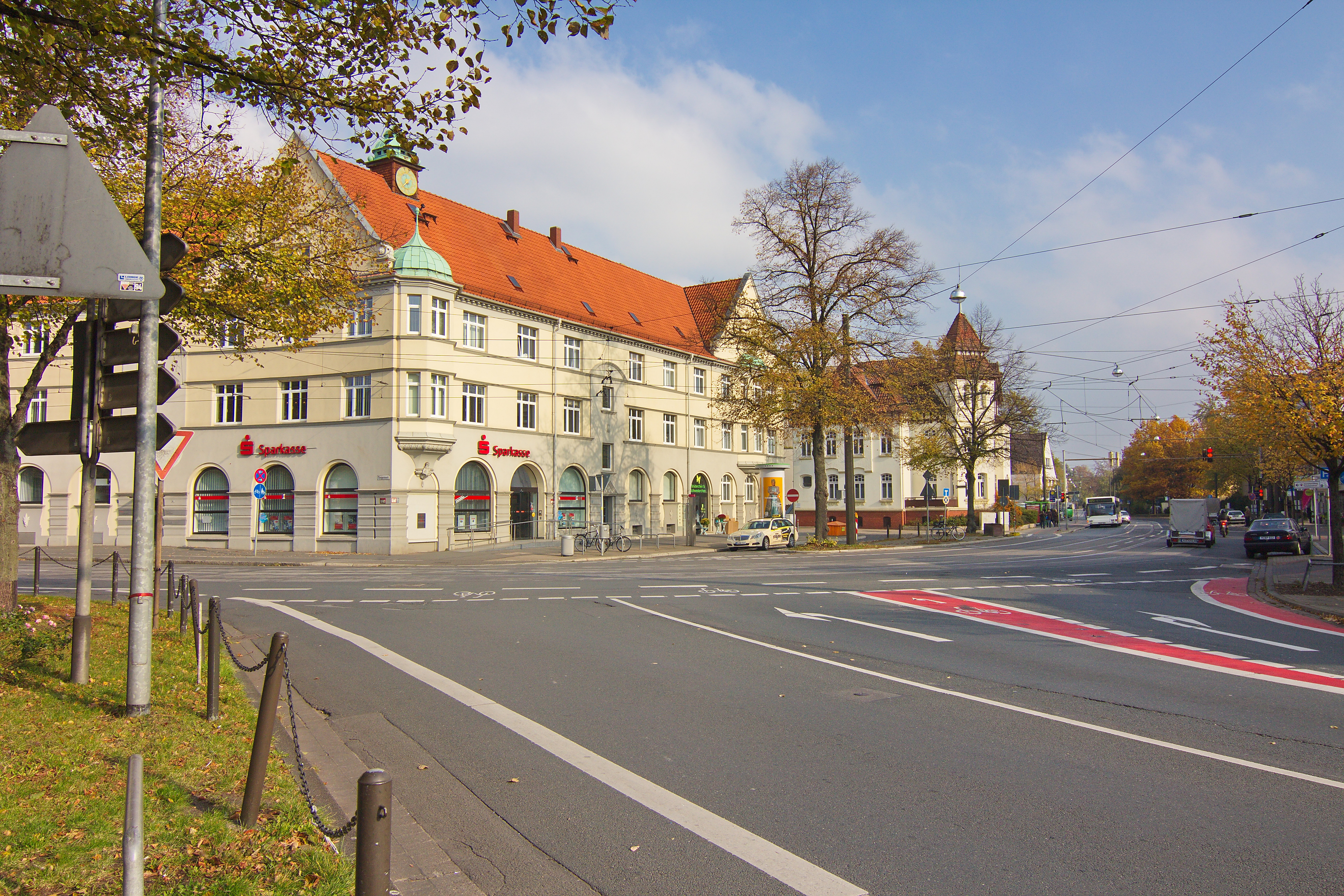 Blick von der Brabeckstraße auf Tiergartenstraße in Kirchrode (Hannover), Niedersachsen, Deutschland